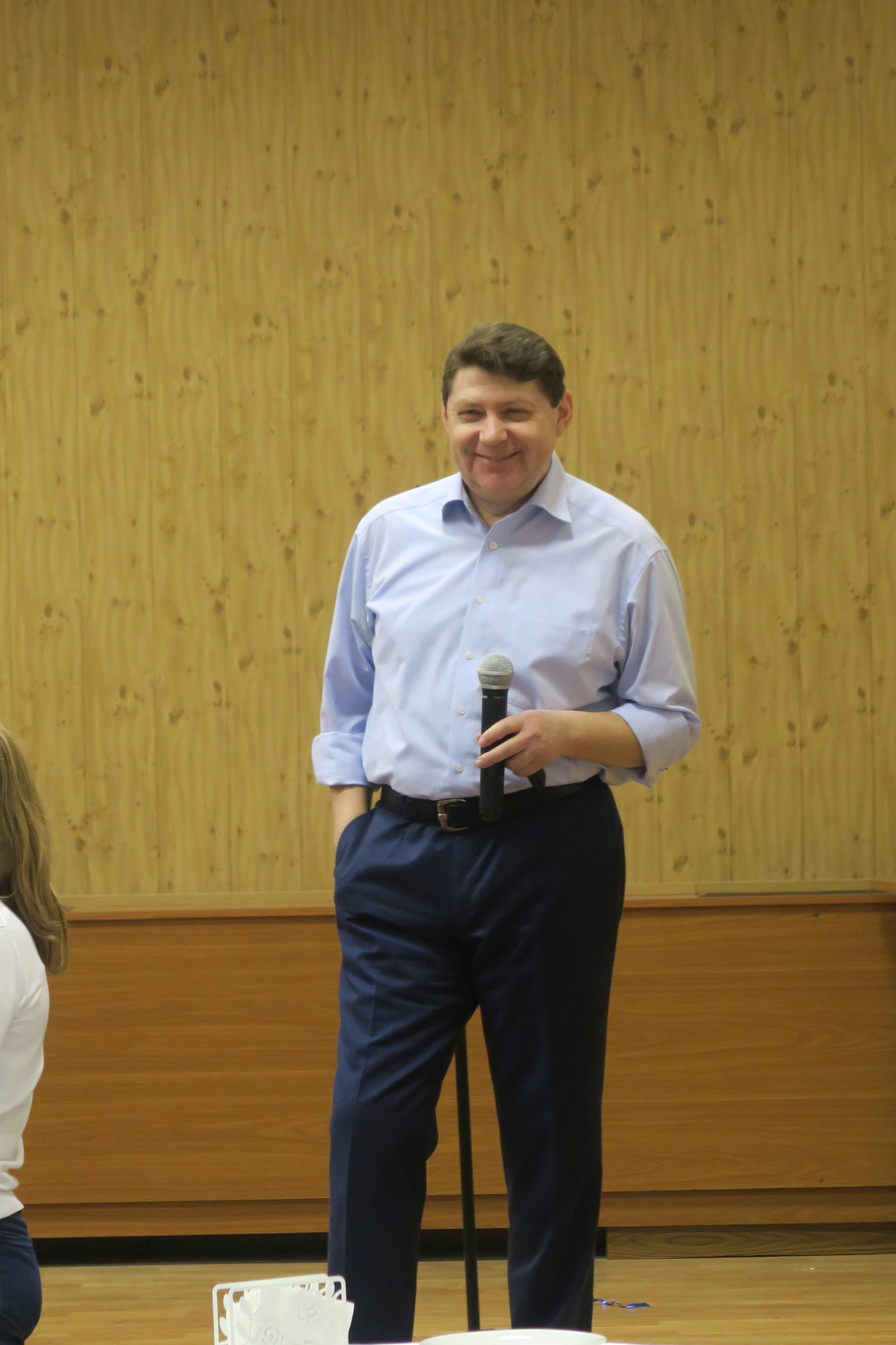 Фото Журавлева Сергея Владимировича, историка, сотрудника ИРИ РАН